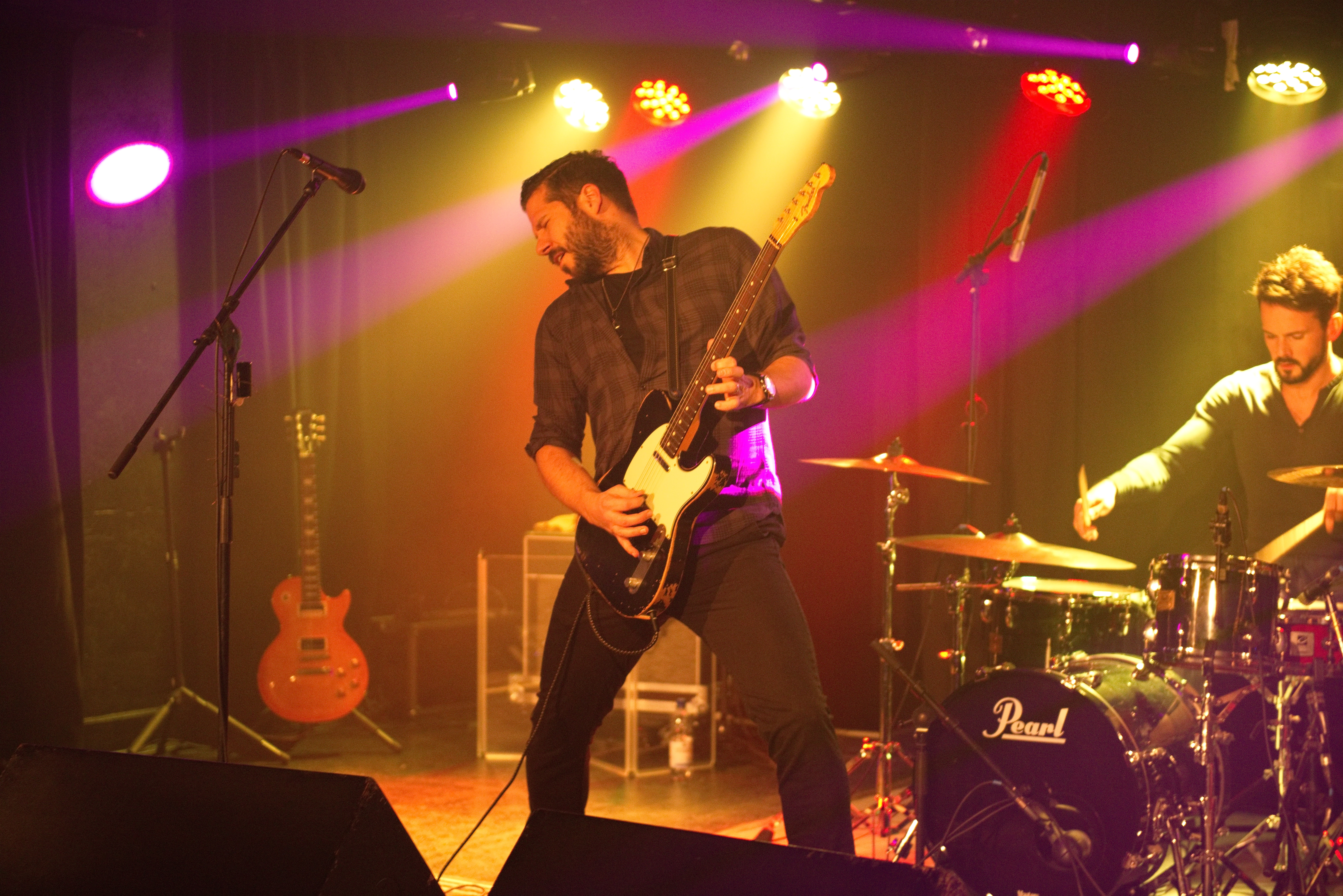 Kris Pohlmnann am 22. Januar 2016 im Live Club Barmen in Wuppertal